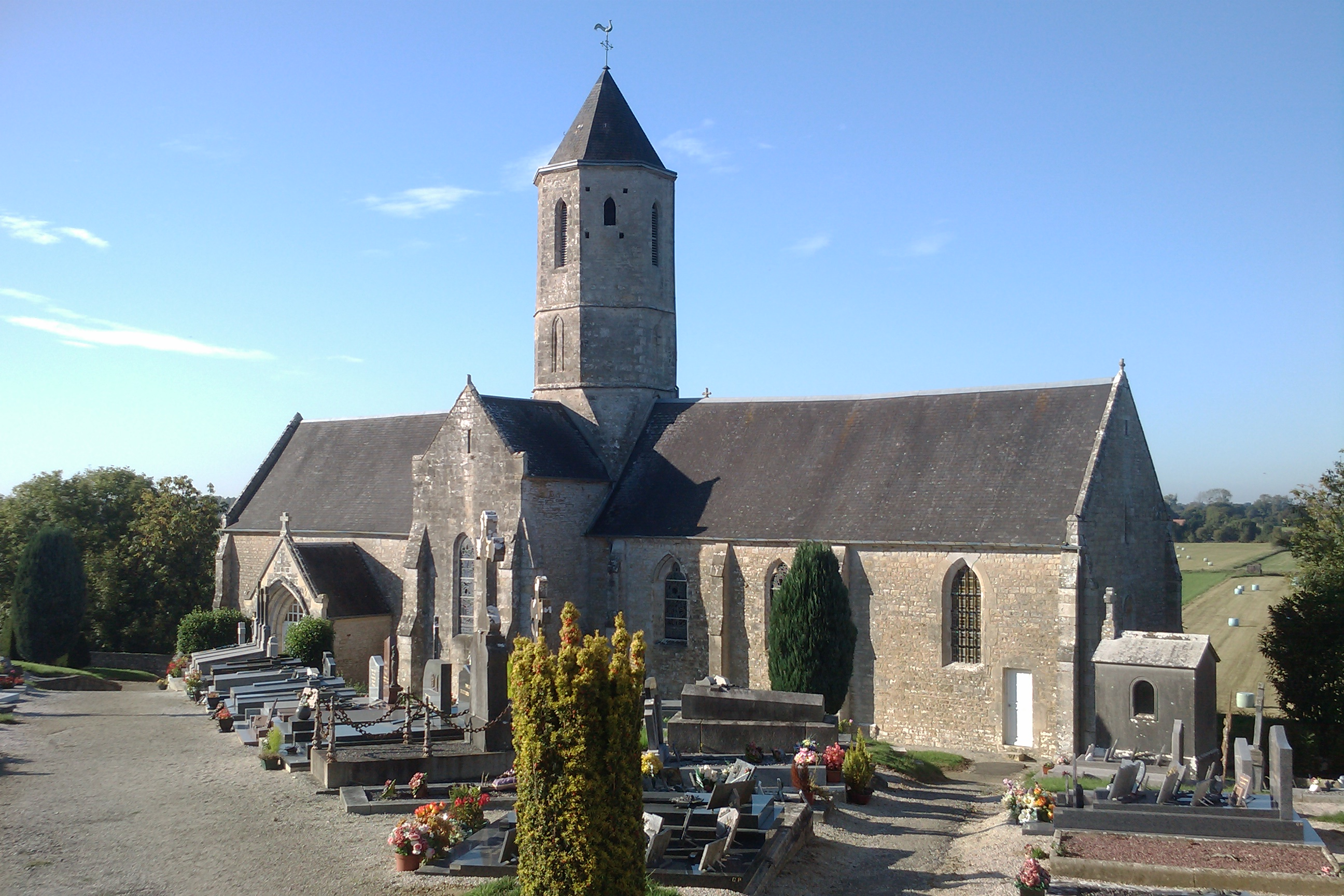 église Saint-Vincent de Beuzeville-la-Bastille